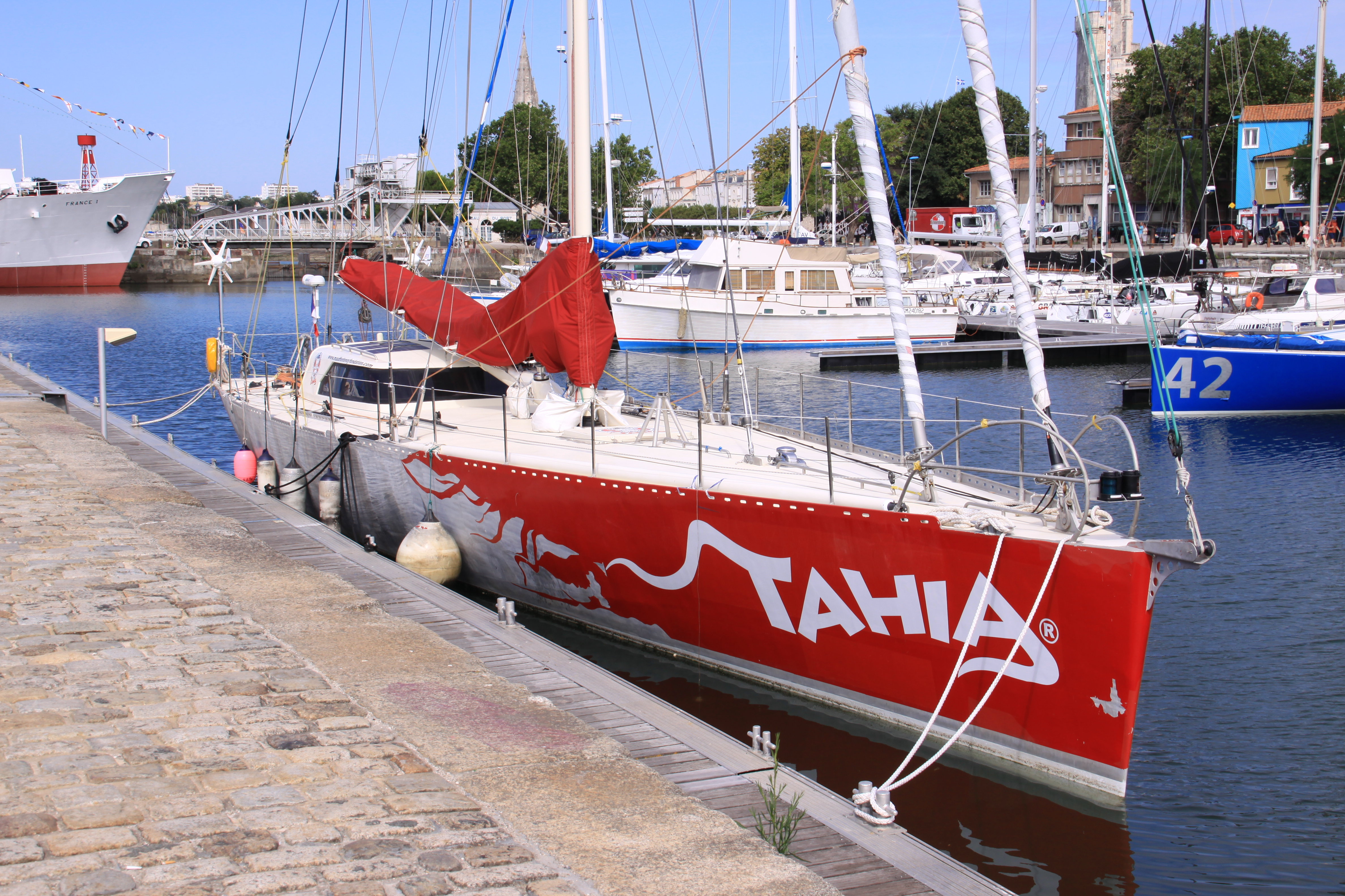 Le voilier « Tahia » amarré dans le Bassin des Chalutiers au port de La Rochelle. Il est le « porte-drapeau » de la fondation Maud Fontenoy qui a pour objet la défense de l’ écosystème marin (protection des océans et du littoral) et de faire découvrir la mer à des enfants malades. Ce voilier, alors appelé « L’ Oréal Paris », est le bateau avec lequel la navigatrice Maud Fontenoy a effectué en 2006-2007 un tour de l' hémisphère sud en solitaire à contre-courant des vents et des courants marins dominants. Elle est partie de La Réunion vers le Cap de Bonne Espérance, puis vers le Cap Horn. Elle a ensuite traversé l’ océan en direction du Cap Leeuwin (Australie) et a rejoint La Réunion. Habituellement, ce périple est effectué dans le sens inverse afin de profiter de la force des vents et des courants marins. Ce voilier (monocoque) à la coque en aluminium a une longueur de 26 mètres, une largeur de 5,40 mètres et un mât de 28,50 mètres de hauteur. Sa grand voile mesure 170 m2 et son spinnaker léger 450 m2 (le lourd 350 m2). Il a été construit en 2001 par les chantiers Gamelin de La Rochelle pour le navigateur Jean-Luc Van den Heede. Il portait, à cette époque, le nom d’ « Adrien ». La Rochelle, Charente Maritime, France.